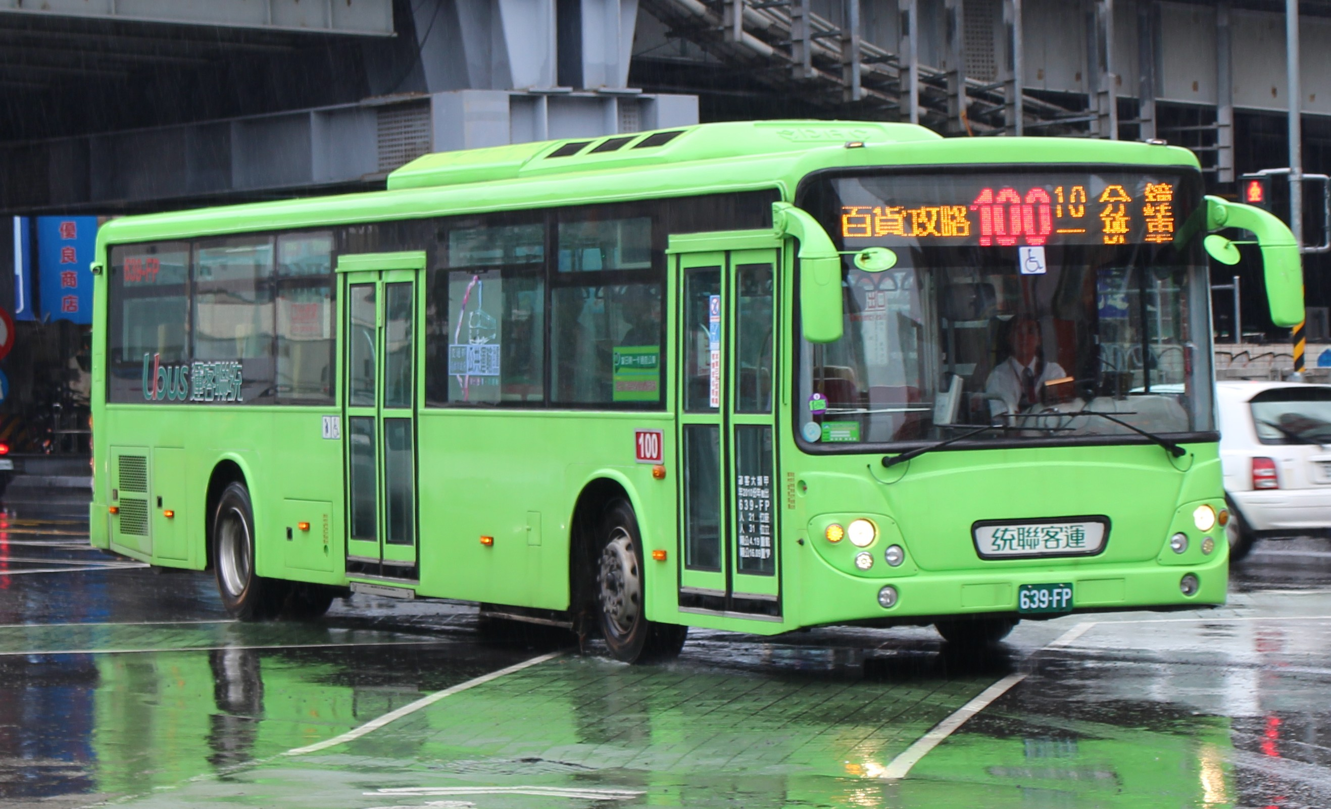 中文（台灣）: 統聯客運大宇BS120CN大客車639-FP，雨中行駛高雄市公車100線。